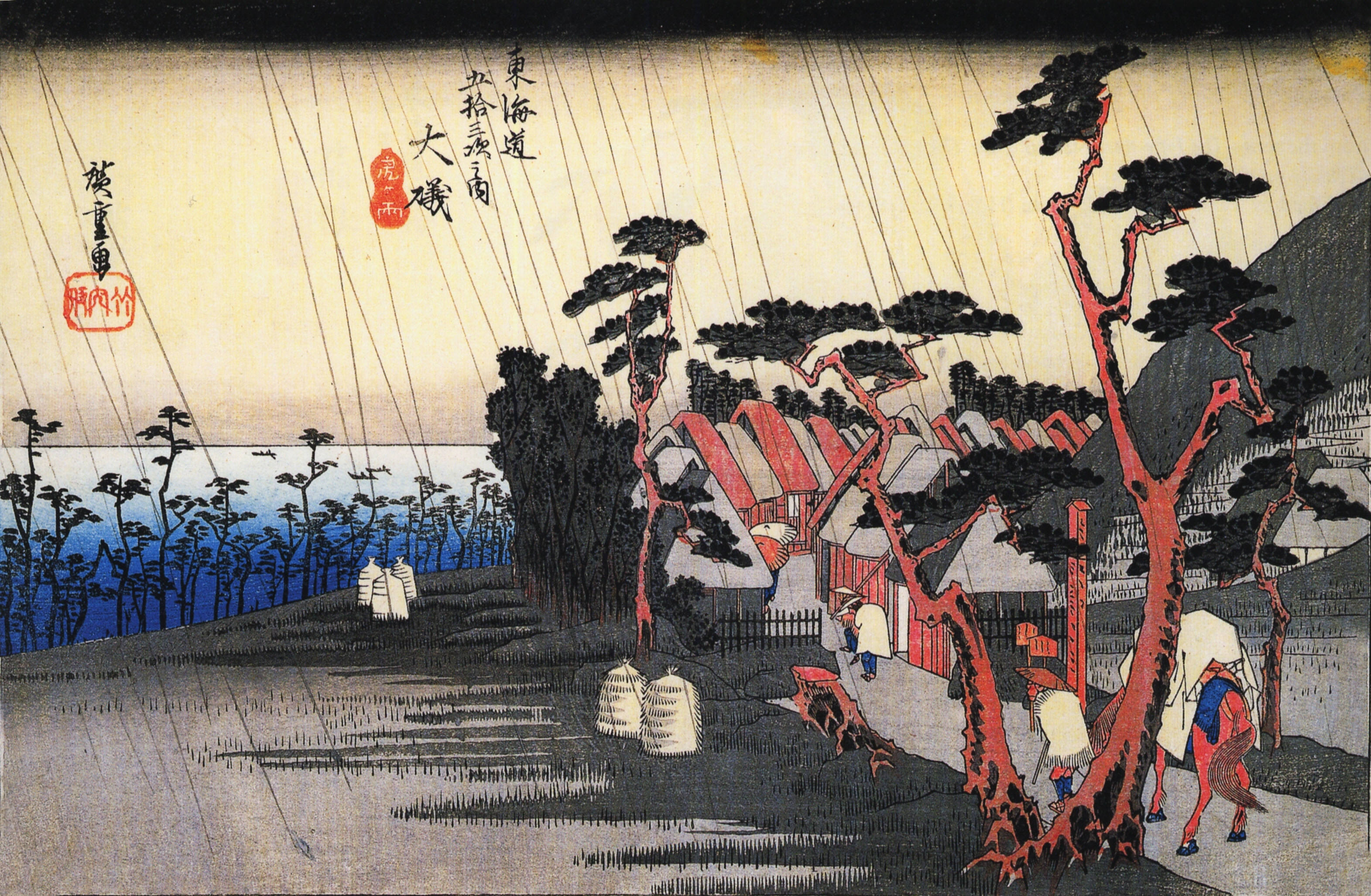 "Tokaido-53tugi Oiso",ukiyo-e by Hiroshige.